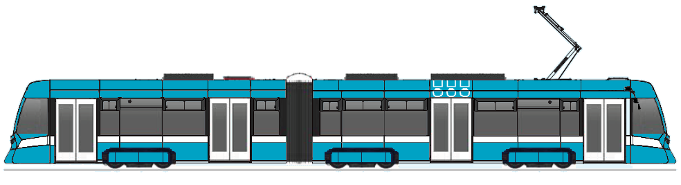 Typenskizze der Straßenbahnen DPO nOVA des Dopravní podnik Ostrava (DPO, Verkehrsbetriebe Ostrava). Die Fahrzeuge werden vom Hersteller Stadler Rail als Tango NF2 bezeichnet.